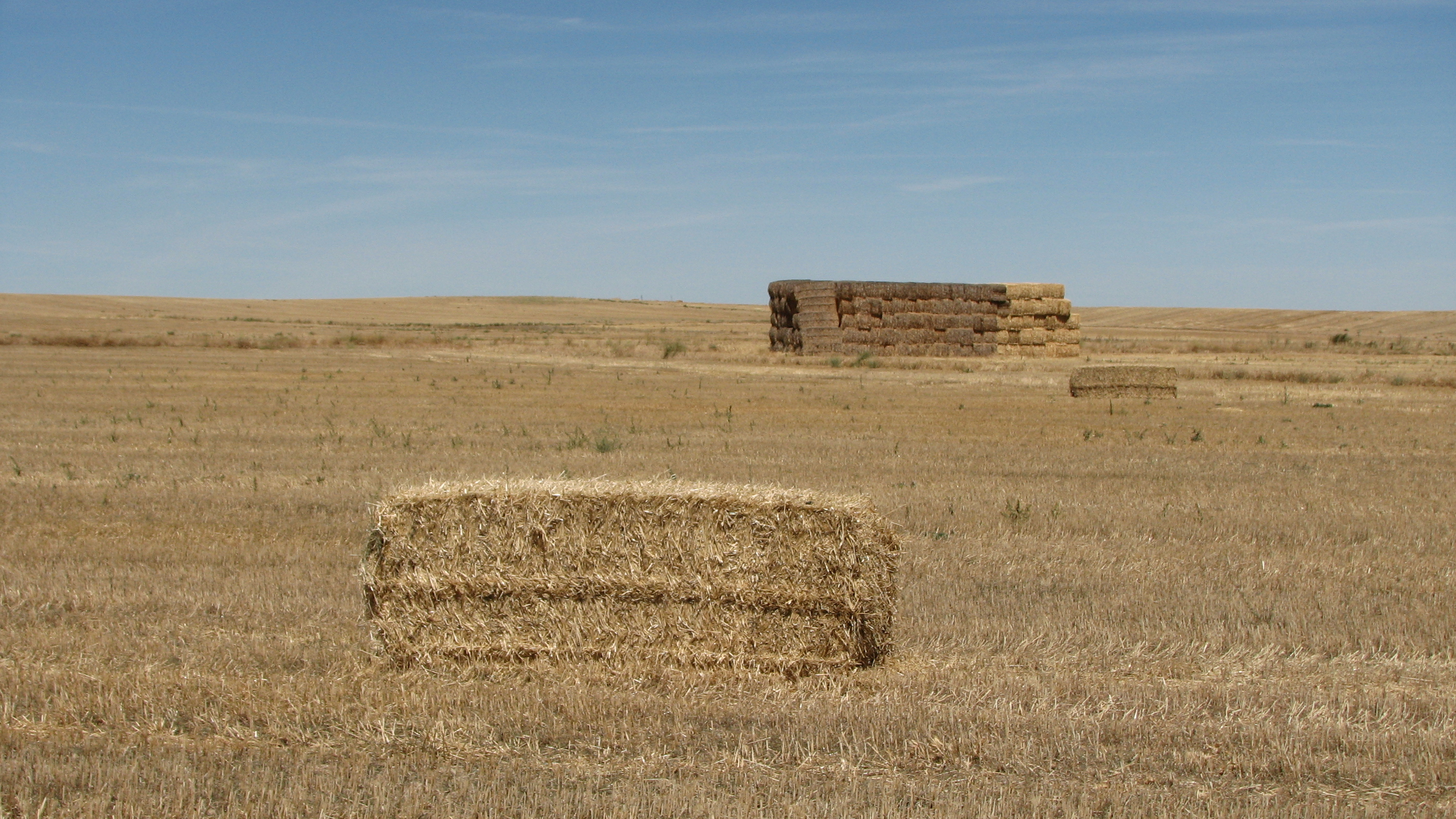 Alpaca gigante rectangular